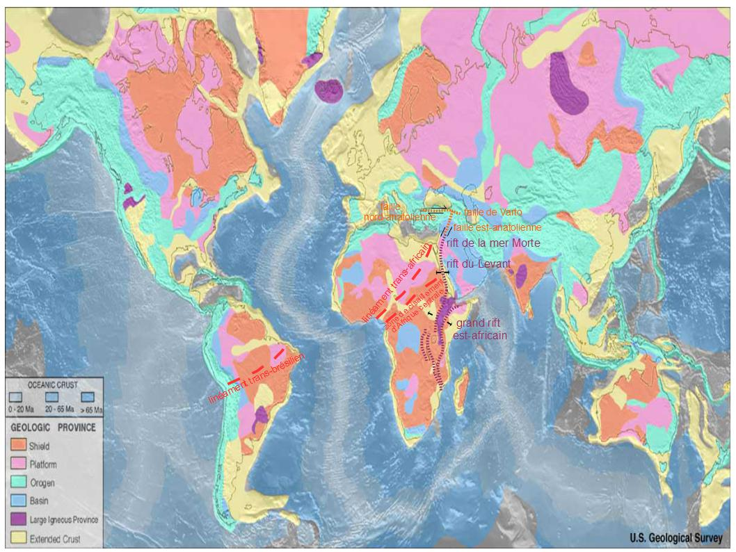 Système de rift est-africain et linéaments africains